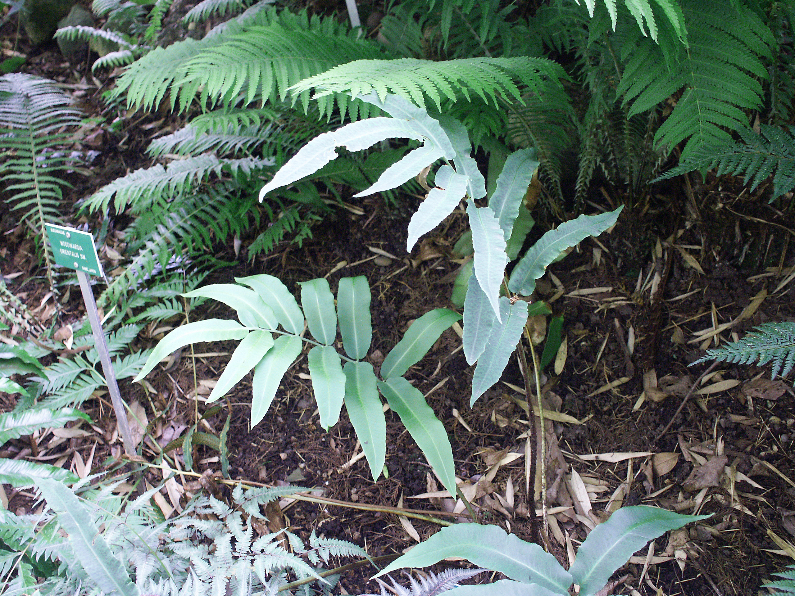 Cyrtomium juglandifolium - aspect de la plante - Jardin botanique de Strasbourg - France